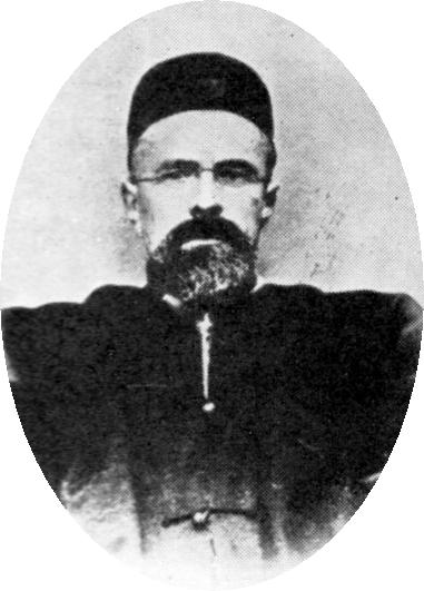 Rémi Isoré missionnaire massacré en Chine